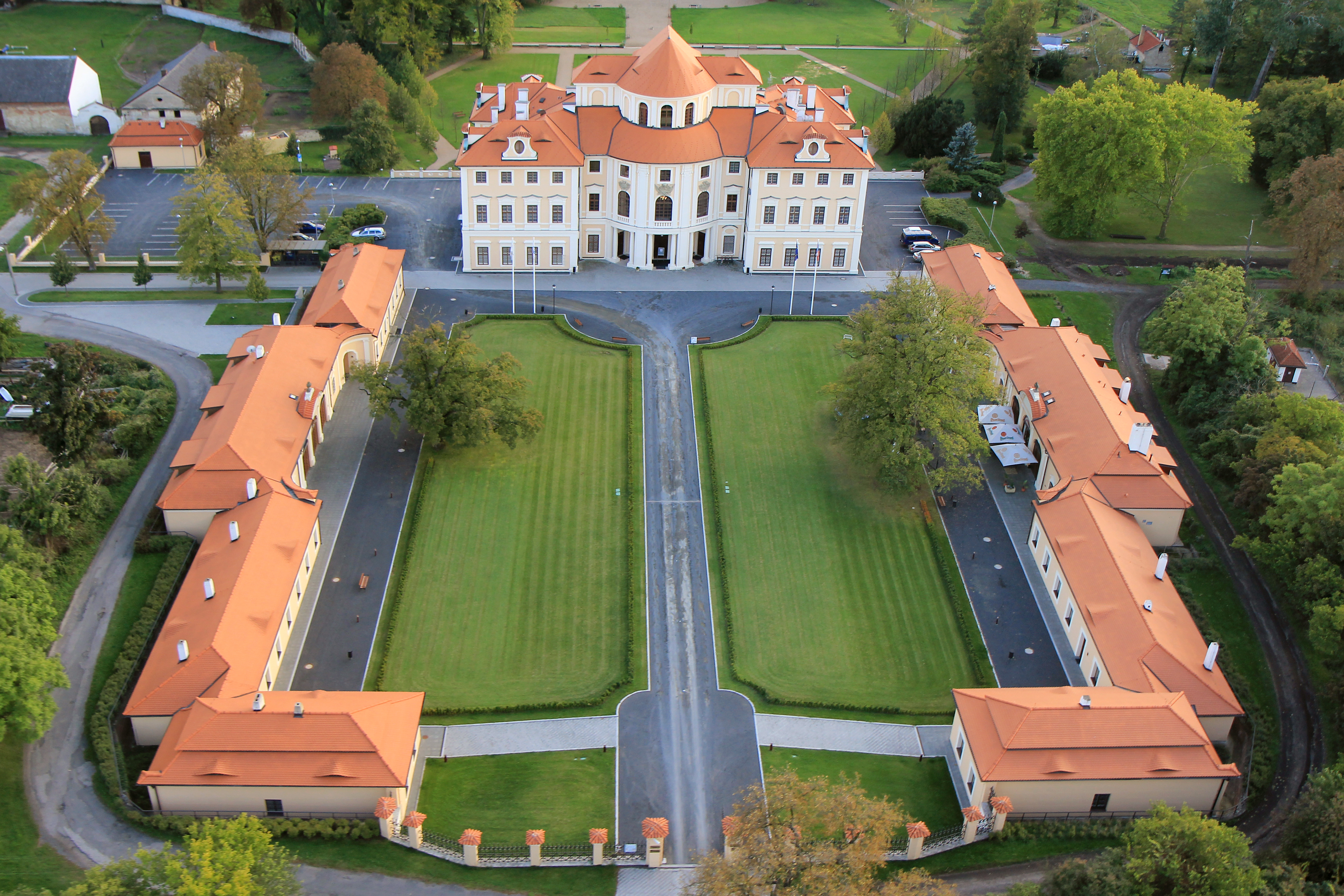 Zámek Liblice, Liblice 63